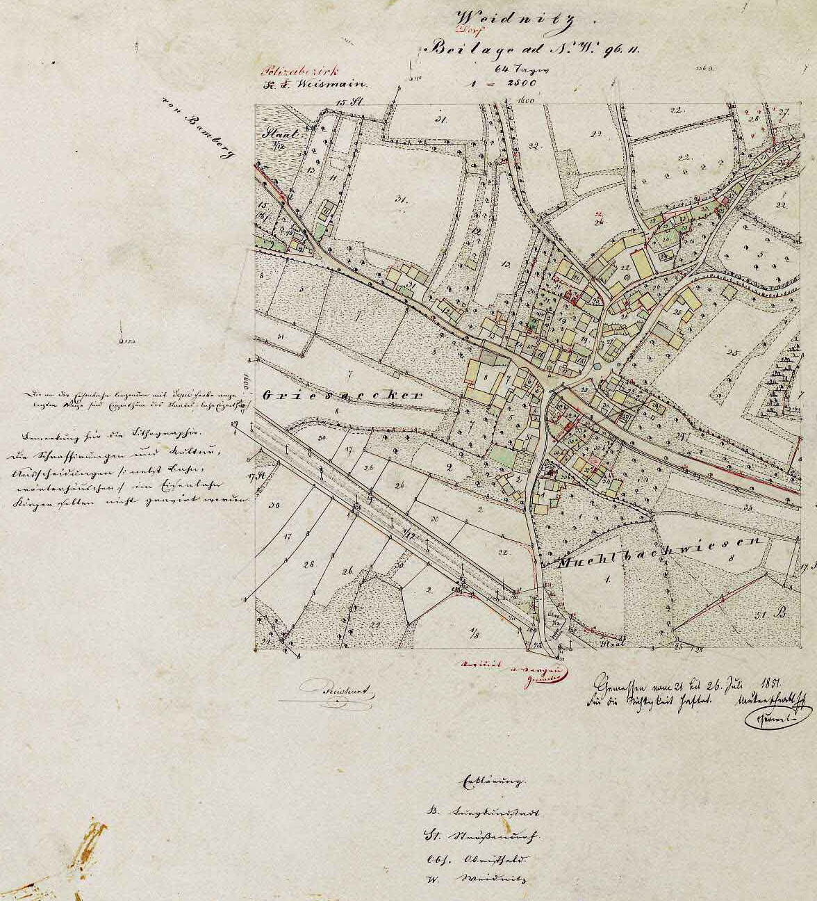 Ortsplan von Weidnitz, M 1:2500